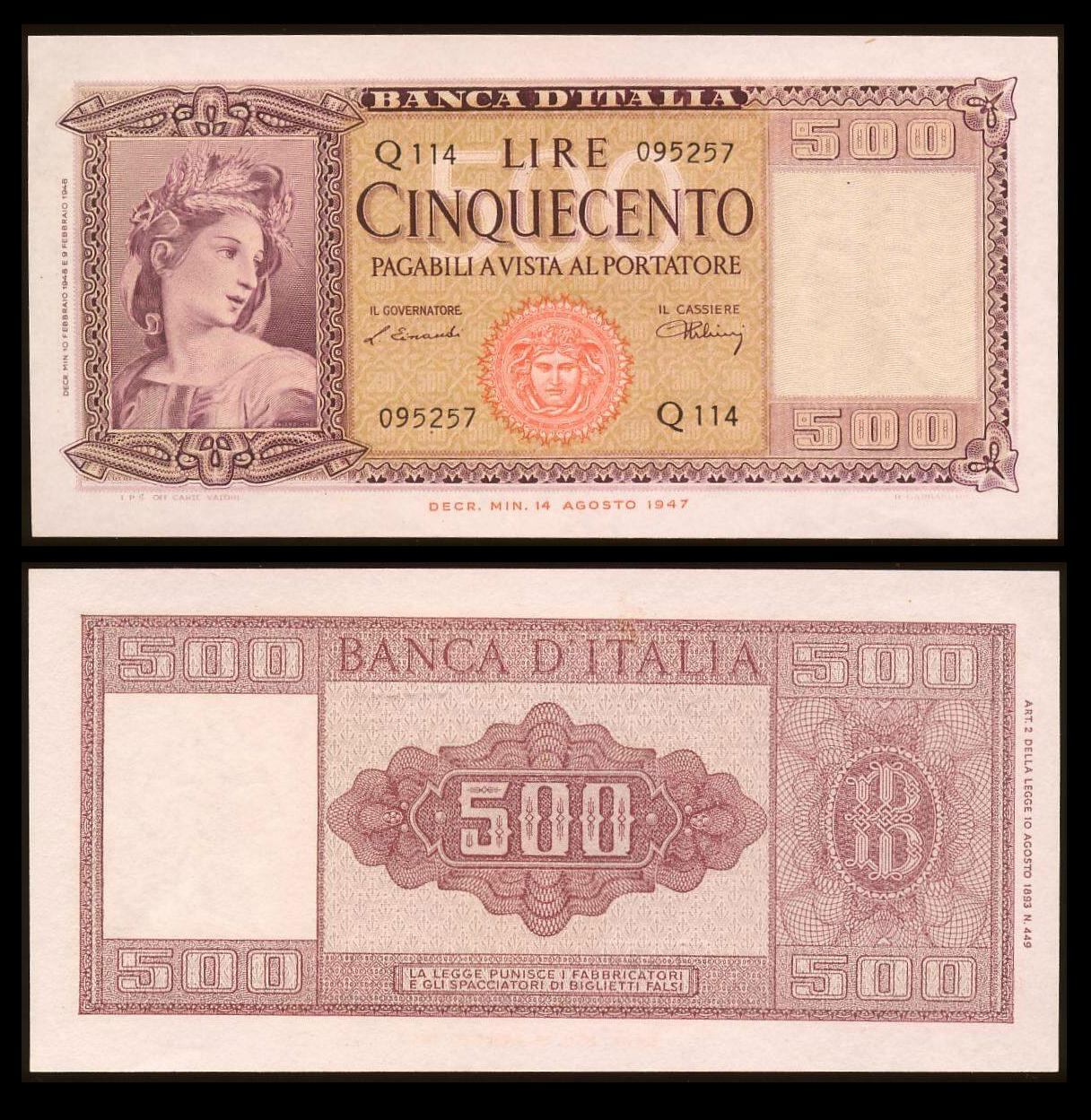 £ 500 (Corona di grano)